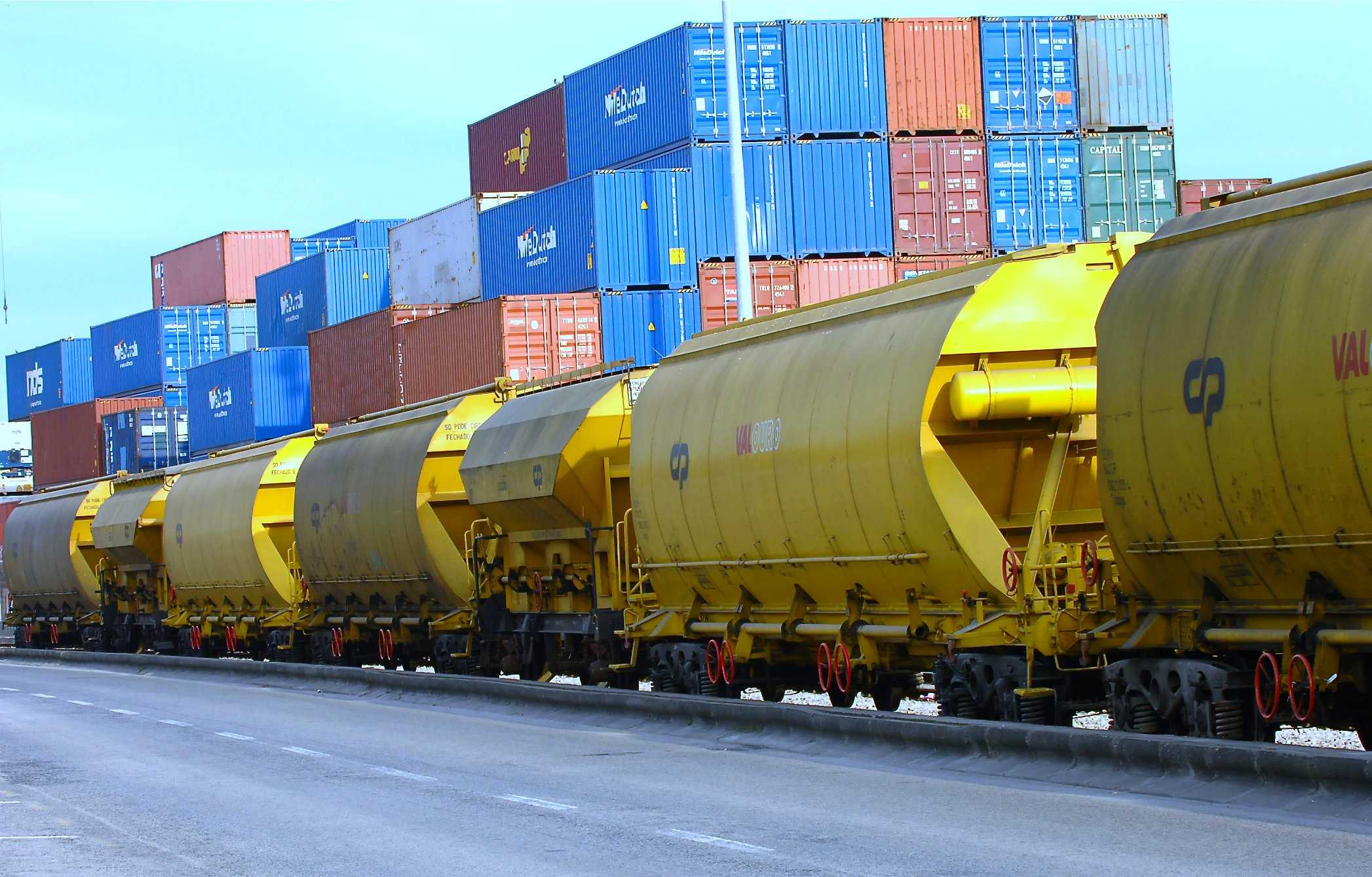 Lisbon, Portugal